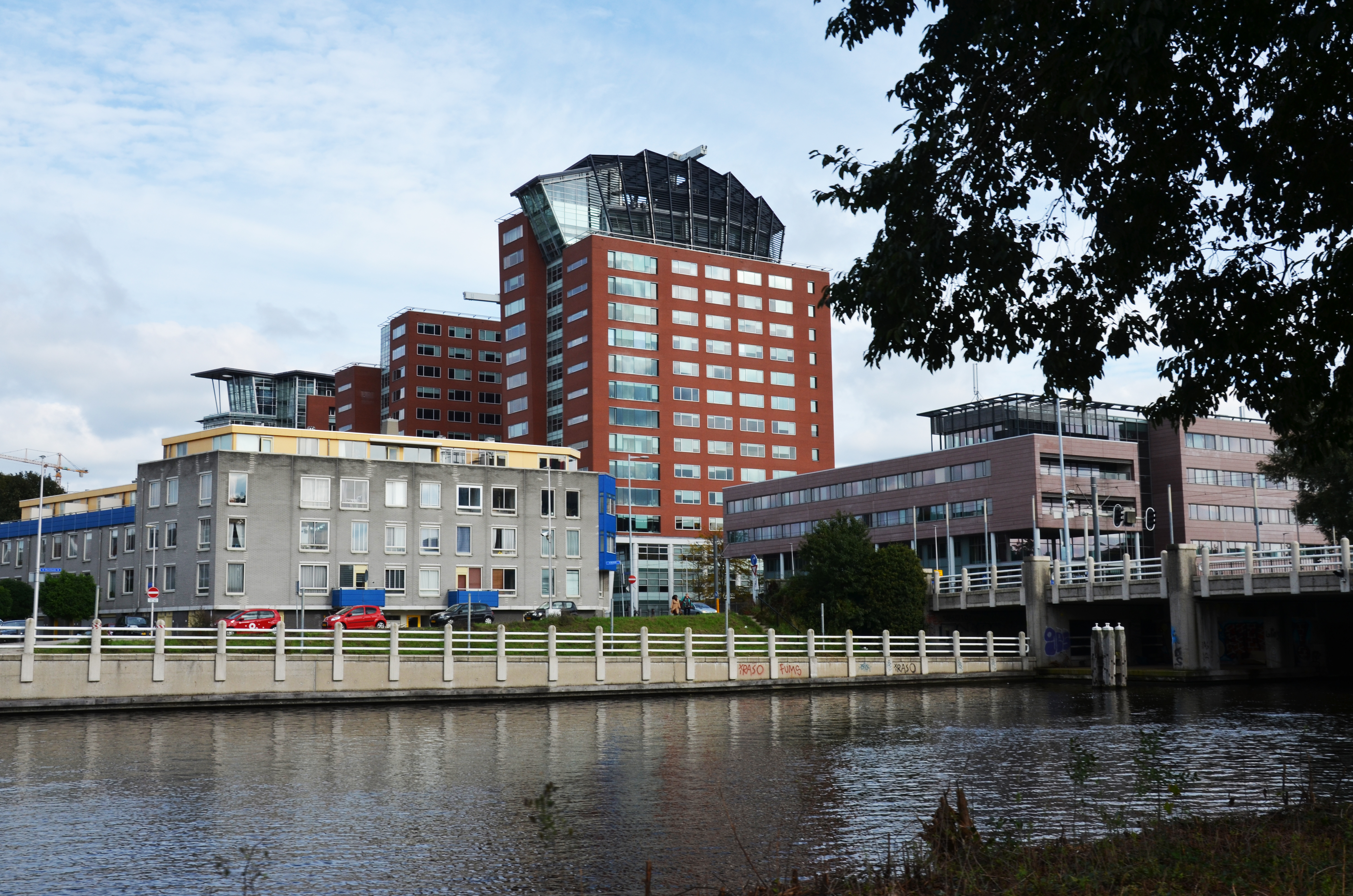 Het gebouw van het College ter Beoordeling van Geneesmiddelen in Utrecht, vanaf de Kanaalweg.